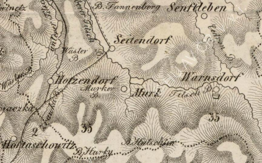 Mořkov na Schenklově mapě krajů (v měřítku cca 1 : 200 000). Autorem mapy je Konrád Schenkl, který mapu vytvářel v letech 1841 až 1845. Vydána byla v Brně Carlem Winikerem.